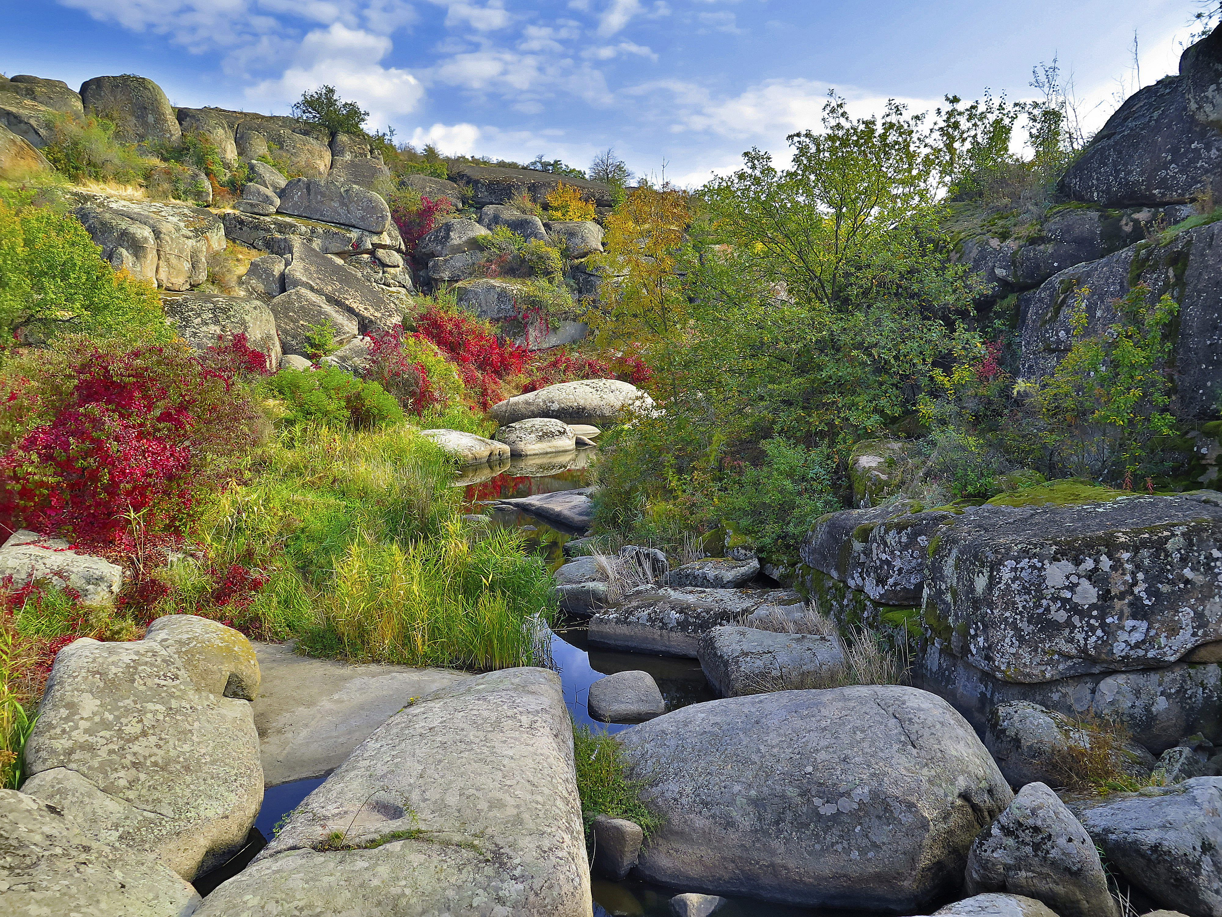 Національний природний парк «Бузький Гард», Кривоозерський, Первомайський, Арбузинський, Вознесенський, Доманівський, Братський р-ни